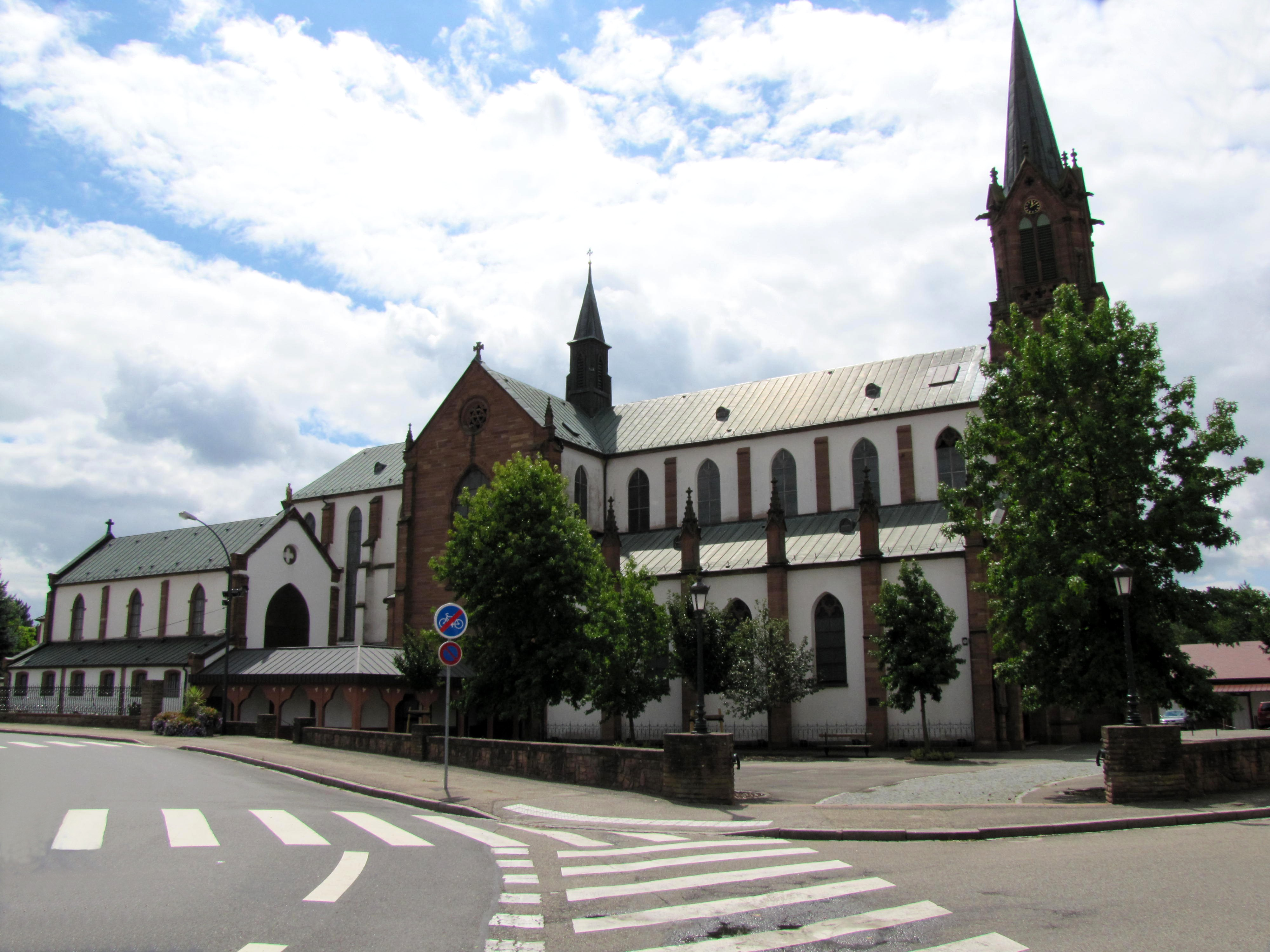 Alsace, Bas-Rhin, Haguenau, Basilique Notre-Dame-des-Douleurs de Marienthal (ancien Prieuré des Guillemites) (IA00062022).